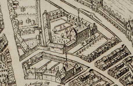 fragment van een kaart van Gouda (Braun en Hogenberg). Het Agnietenconvent (nr. 21) en het Magdalenaconvent (nr. 22) in 1585 (fragment stadskaart 1585)